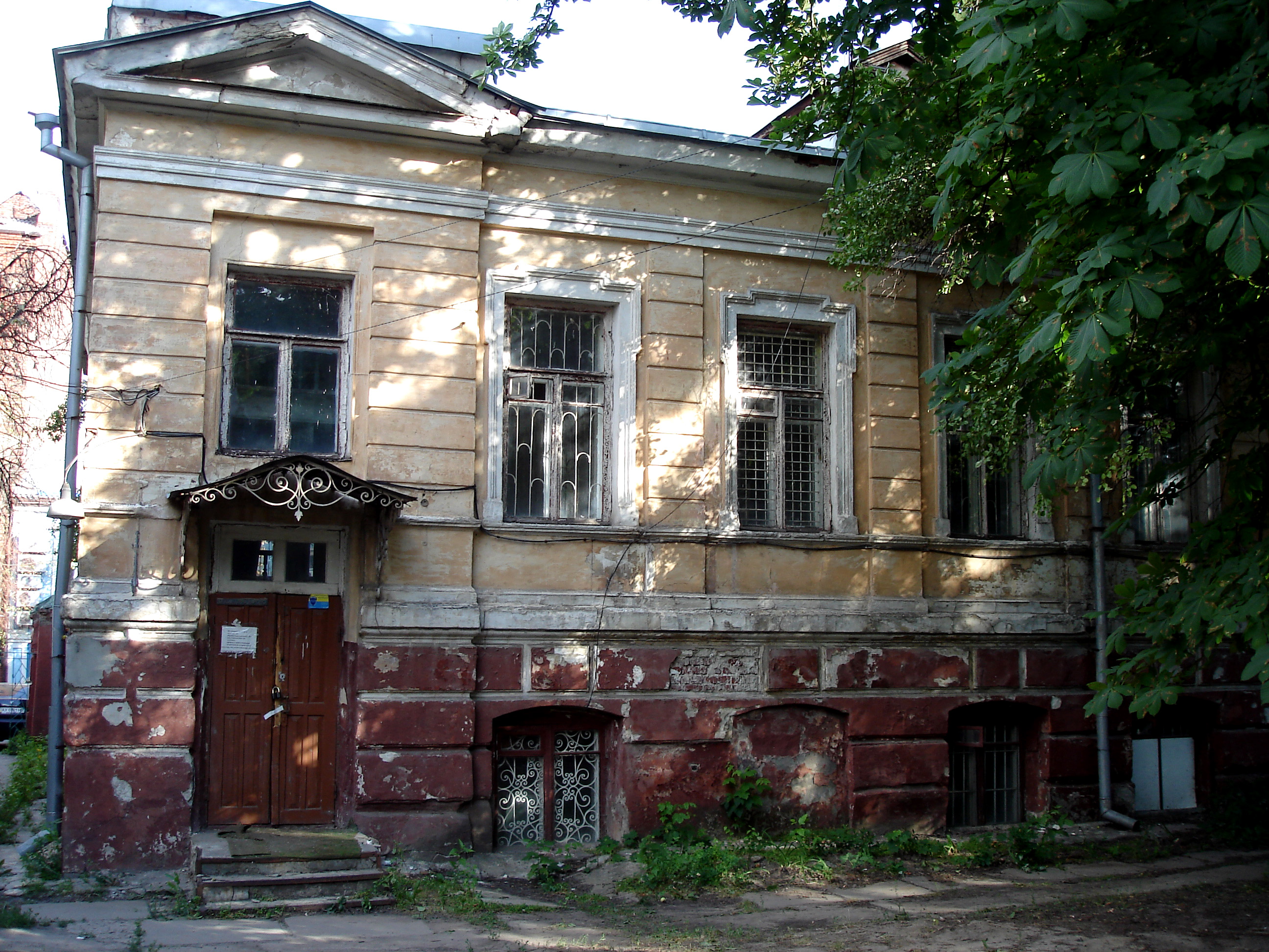 Будинок Сурукчі, що належав харківському лікарю-оториноларингологу Степану Гавриловичу Сурукчі. В ньому проходили творчі вечори, в яких брали участь відомі митці, зокрема, Федір Шаляпін та Олександр Вертинський. Червень 2013 року. Вигляд будинку з двору.Розташований на вулиці Садовій (на момент зйомки — Чубаря), 7.